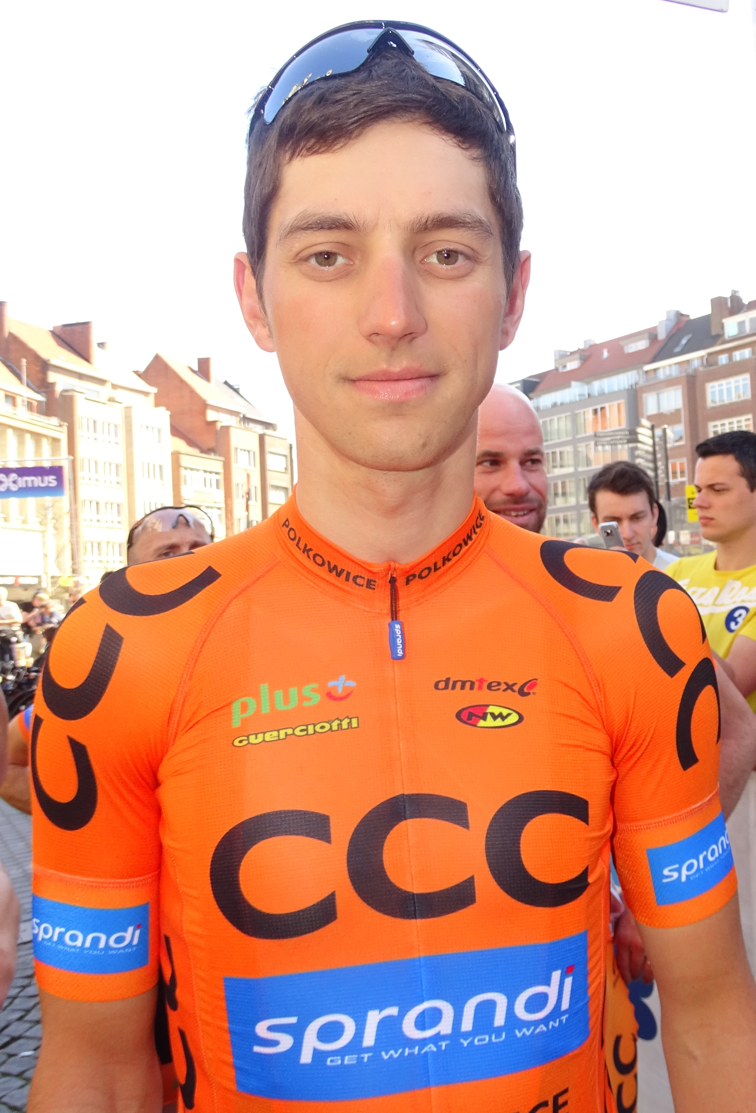 Reportage réalisé le mercredi 15 avril à l'occasion du départ de la Flèche brabançonne 2015 à Louvain, Belgique.